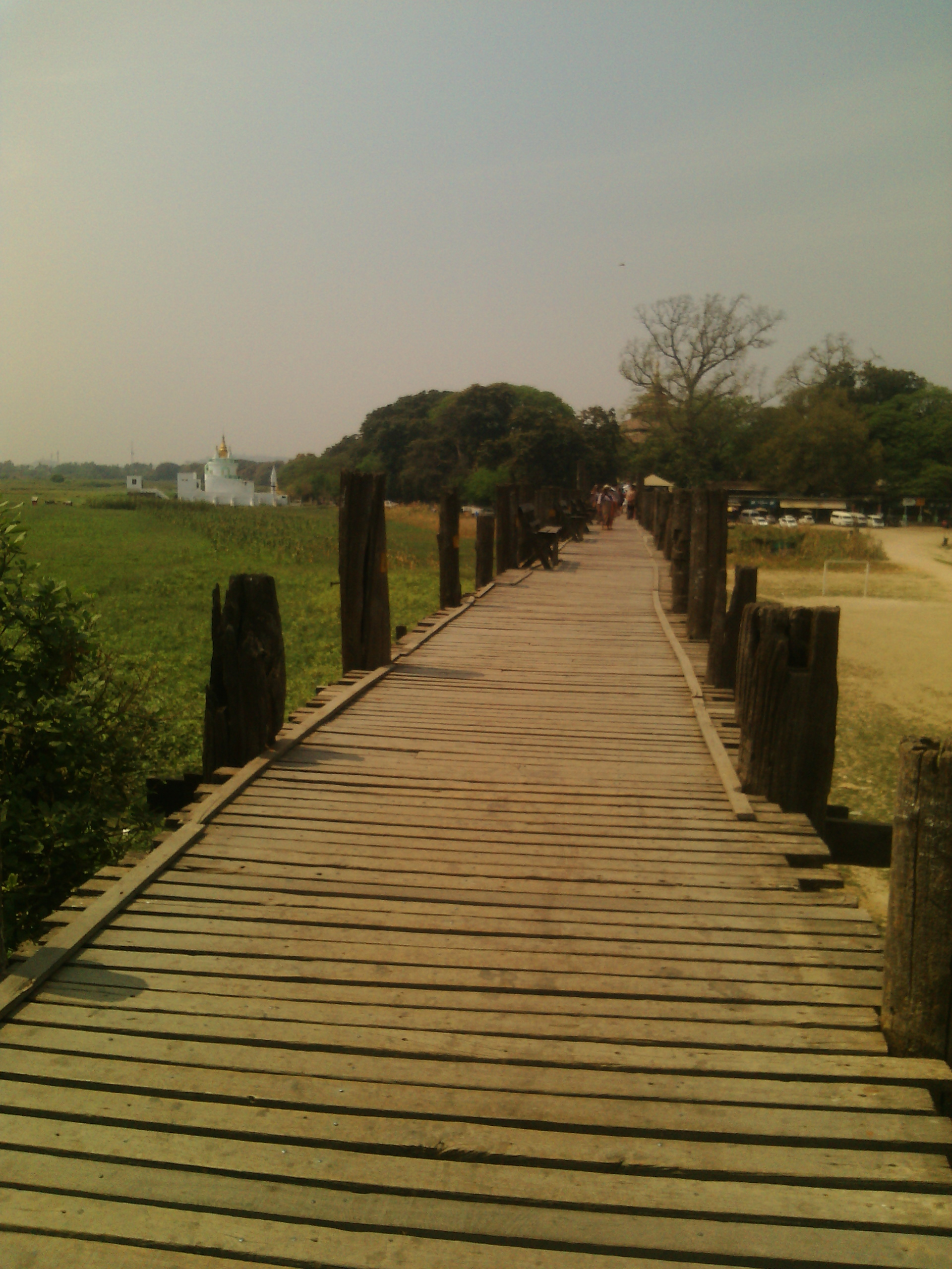 မြန်မာဘာသာ: ဦးပိန် ၂၀၁၆